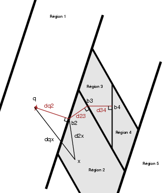 Description: Représentation graphique du critère d'élimination utilisé par l'arbre d'axes principaux Source: David Delbecq, d'après une illustration présente dans INNOVATIONS IN LOCAL MODELING FOR TIME SERIES PREDICTION, a dissertation submitted to the department of electrical engineering and the committee on graduate studies of stanford university in partial fulfillment of the requirements for the degree of doctor of philosophy ( James McNames, May 1999) Licence